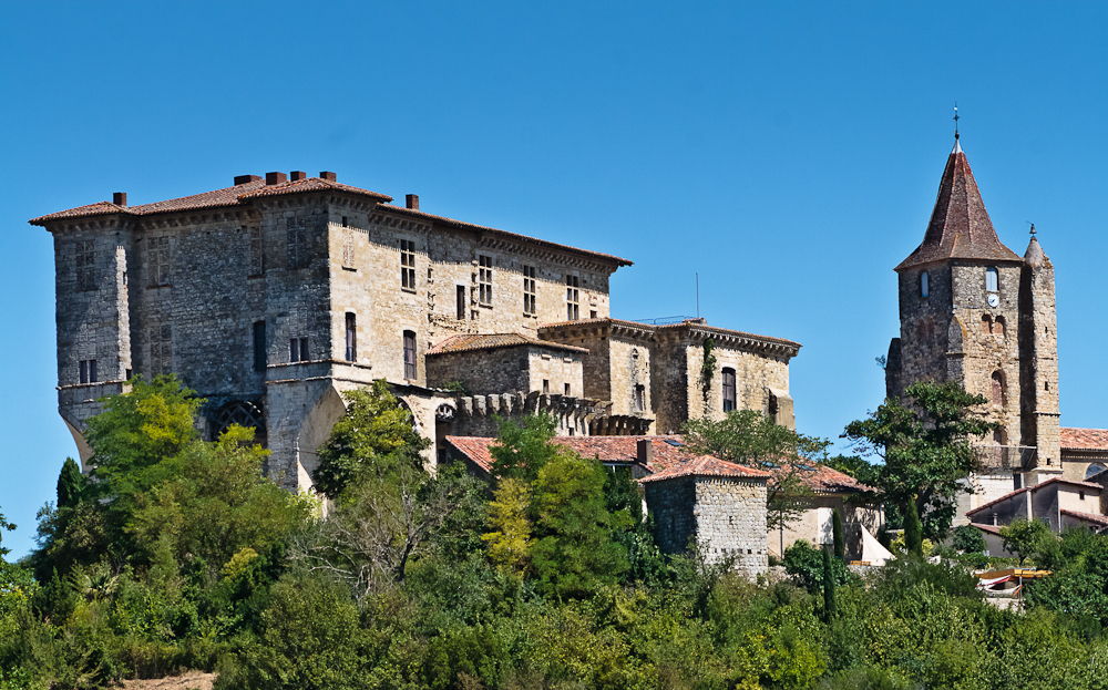 Vue générale - Château et église